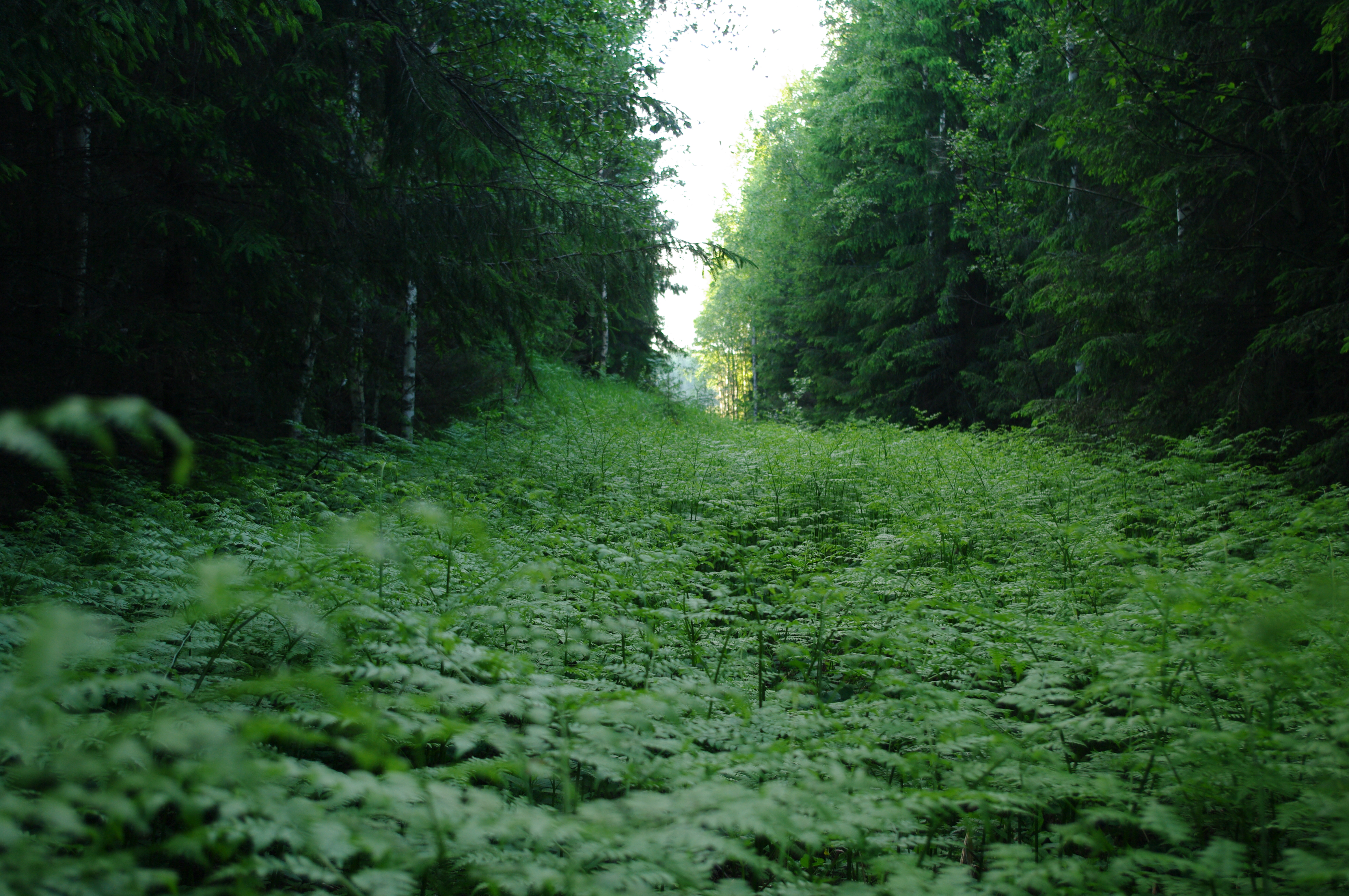 Kisõjärve maastikukaitseala Misso vallas